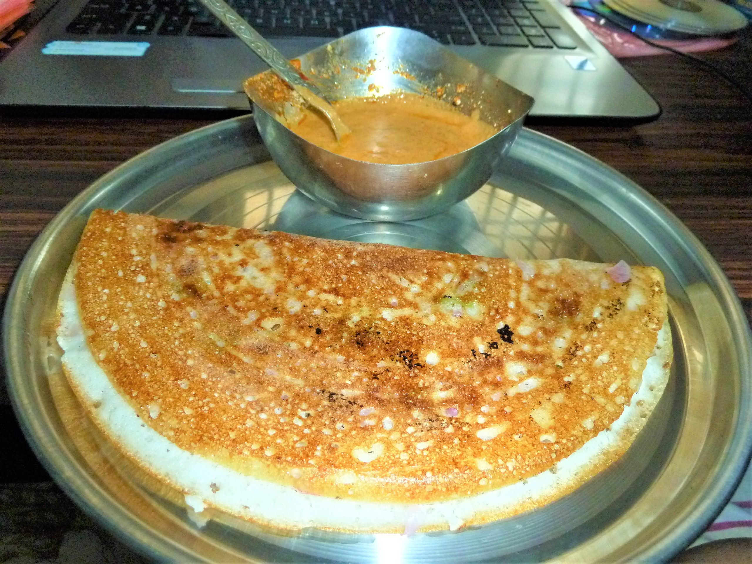 మినప దోసె